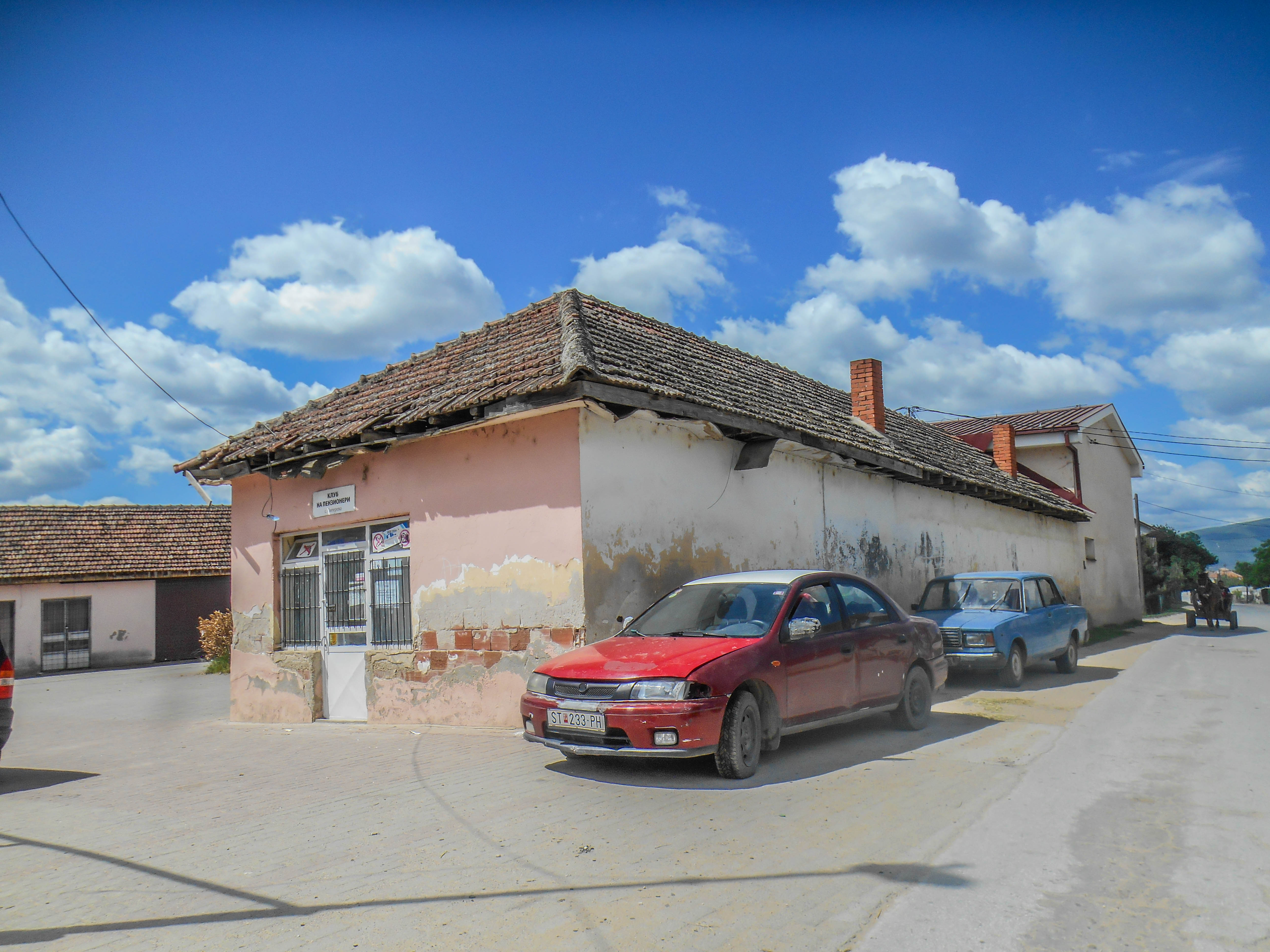 Клуб на пензионери